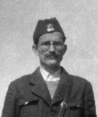 Ivan Milutinović, ritaglio da File:Arso Jovanović, Mitar Bakič and Ivan Milutinović.jpg.